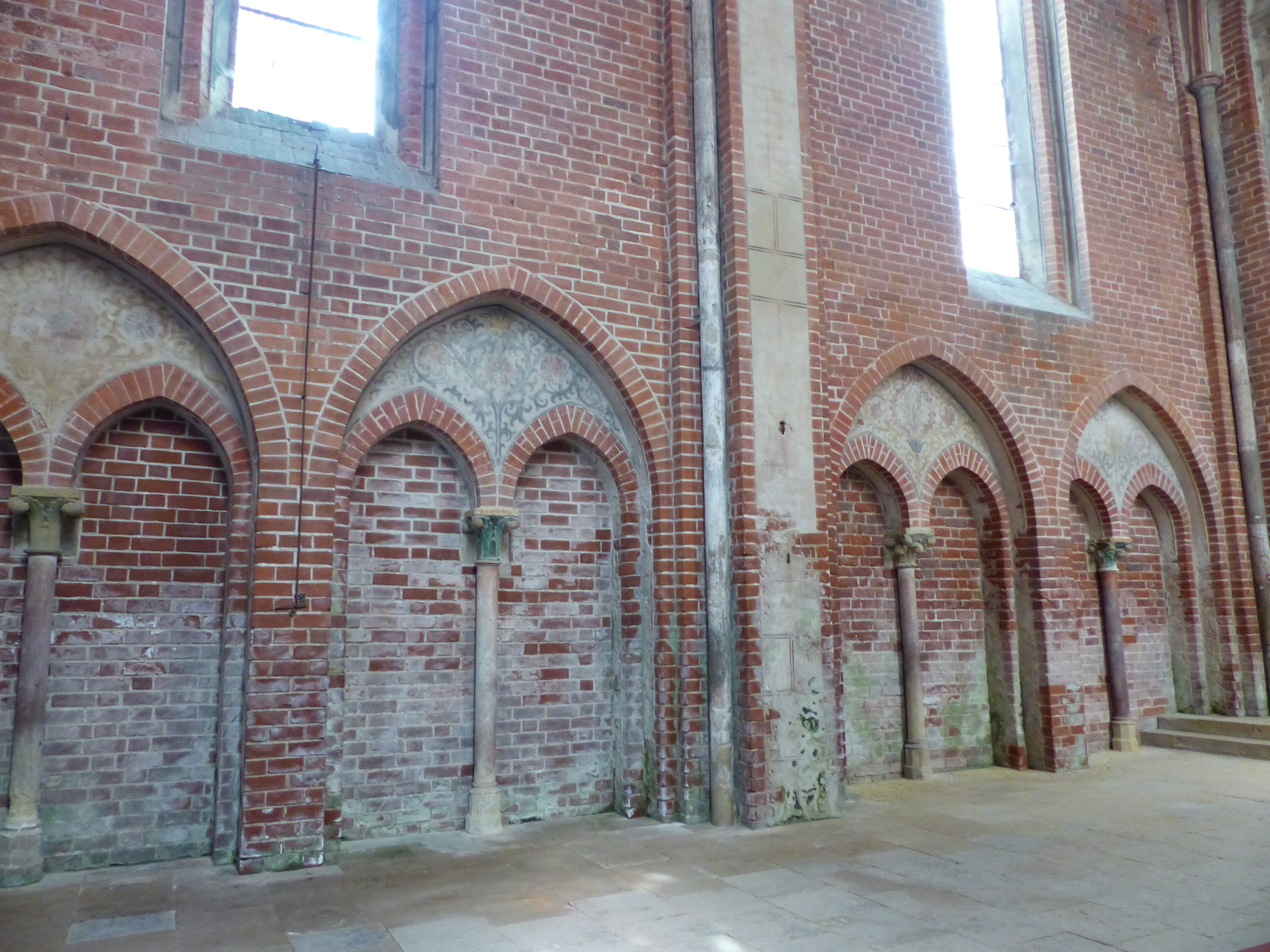 Klosterkirche St. Maria (Mühlberg an der Elbe), Brandenburg